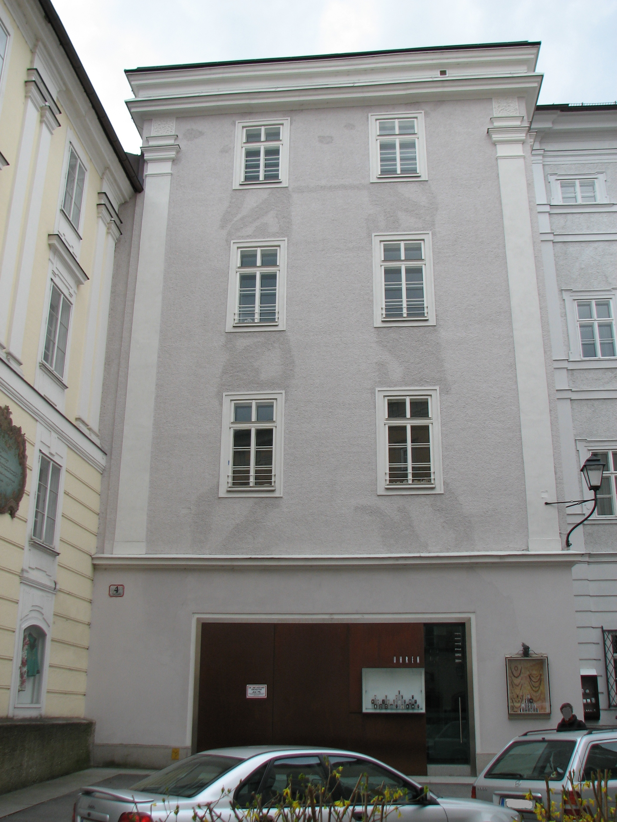 Wohn- und Geschäftshaus, ehem. St. Salvators- oder rote Bruderschaftskirche